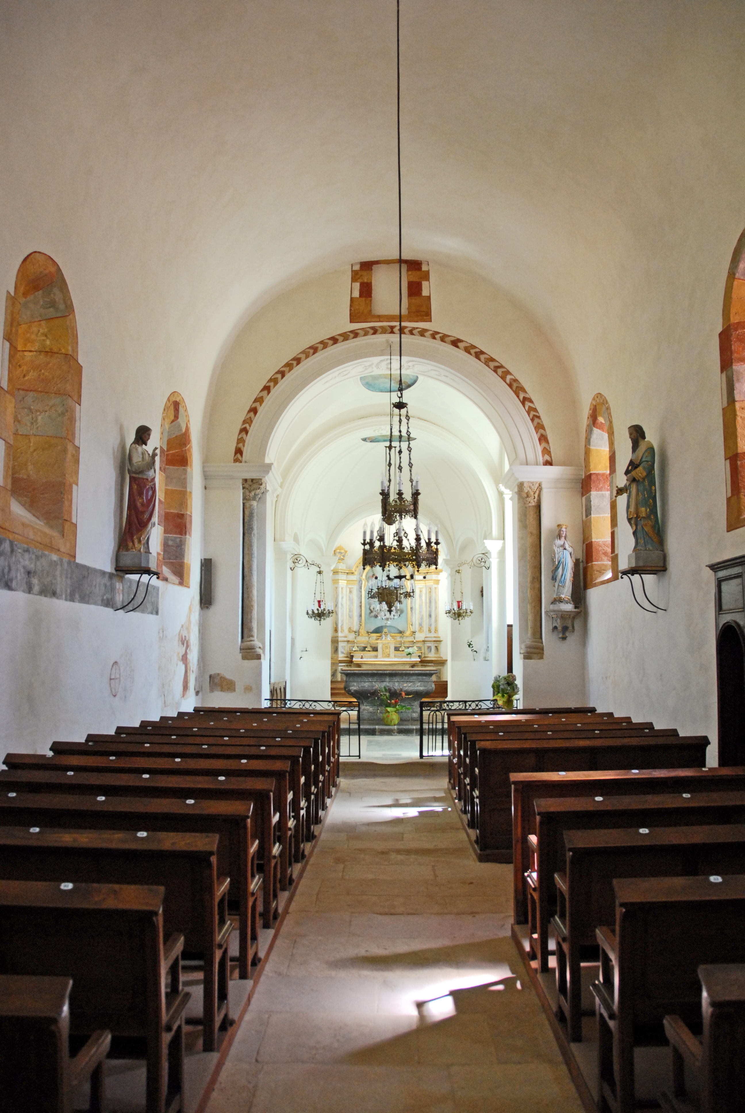 Sts-Pierre-et-Paul de Montceaux-l'Étoile, Schiff zum Chor